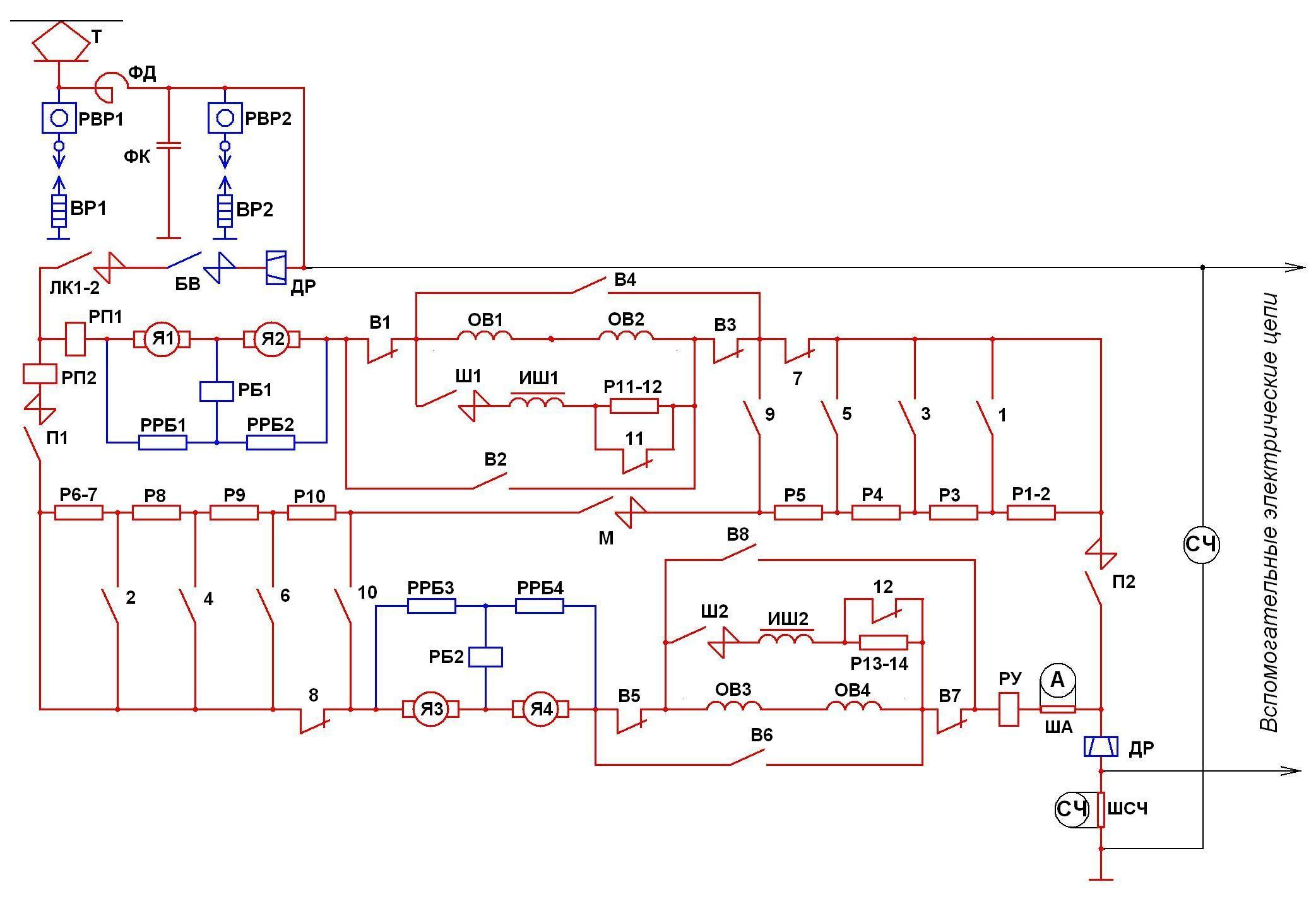 Принципиальная силовая схема моторного вагона ЭР2